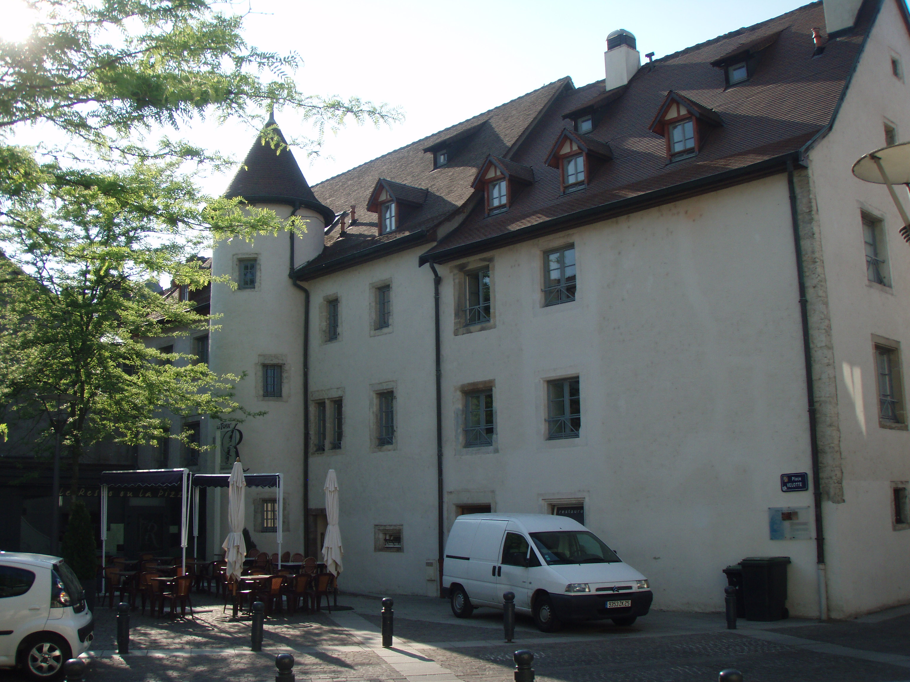 Ferme de la Souaberie, Montbéliard, France